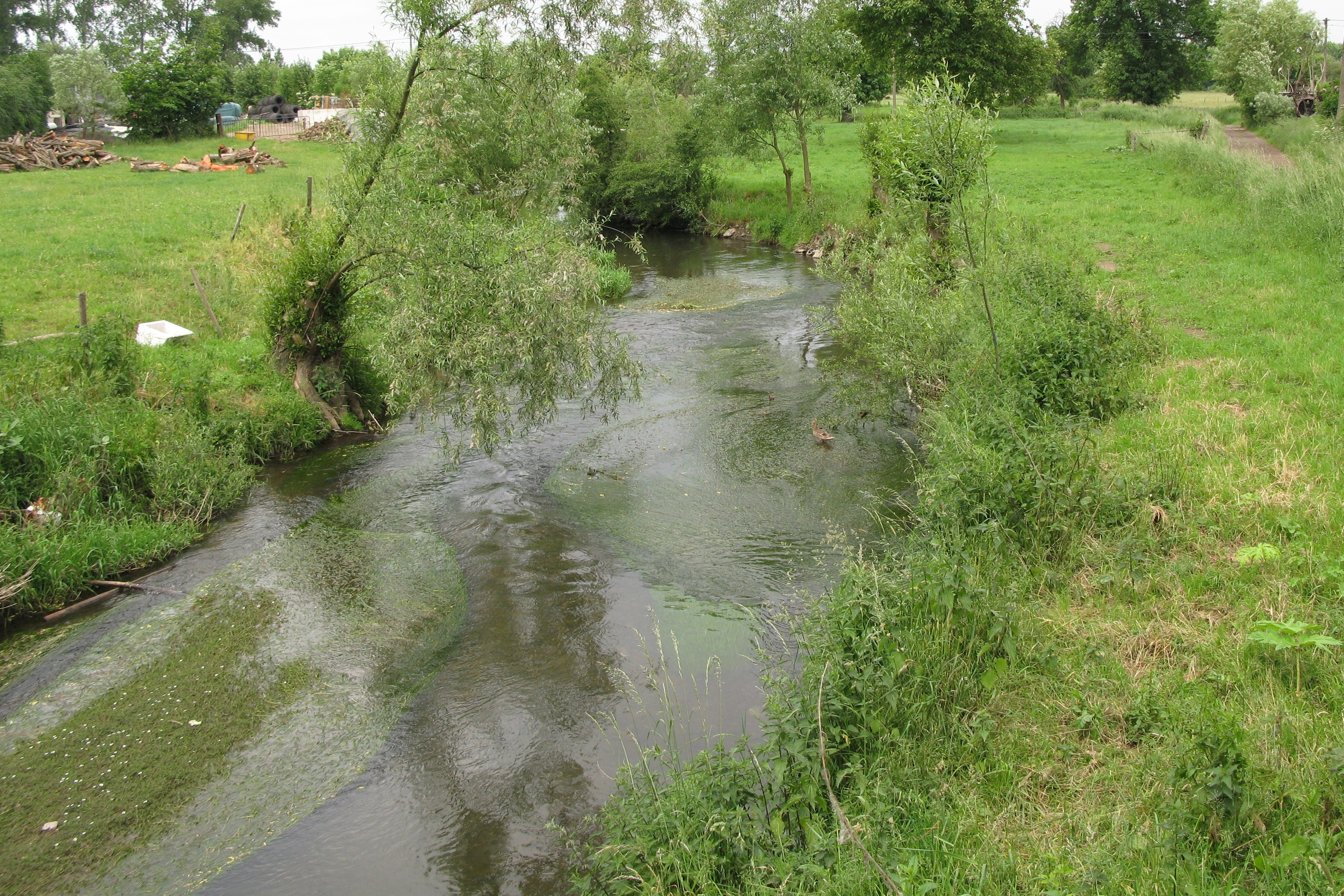 La Berwinne à Berneau